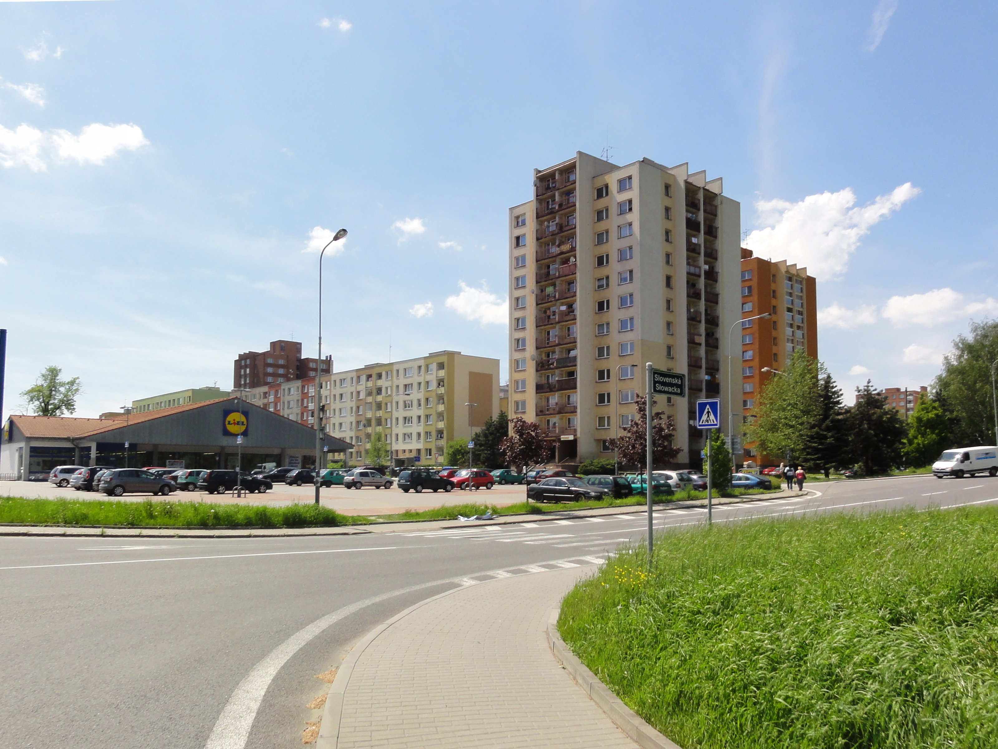 Osiedle z wielkiej płyty w Czeskim Cieszynie-Sibicy